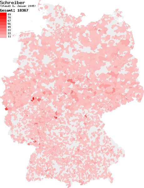 Verteilung des Nachnamens Schreiber in Deutschland nach dem Telefonbuch mit Stand vom 6. Januar 2005